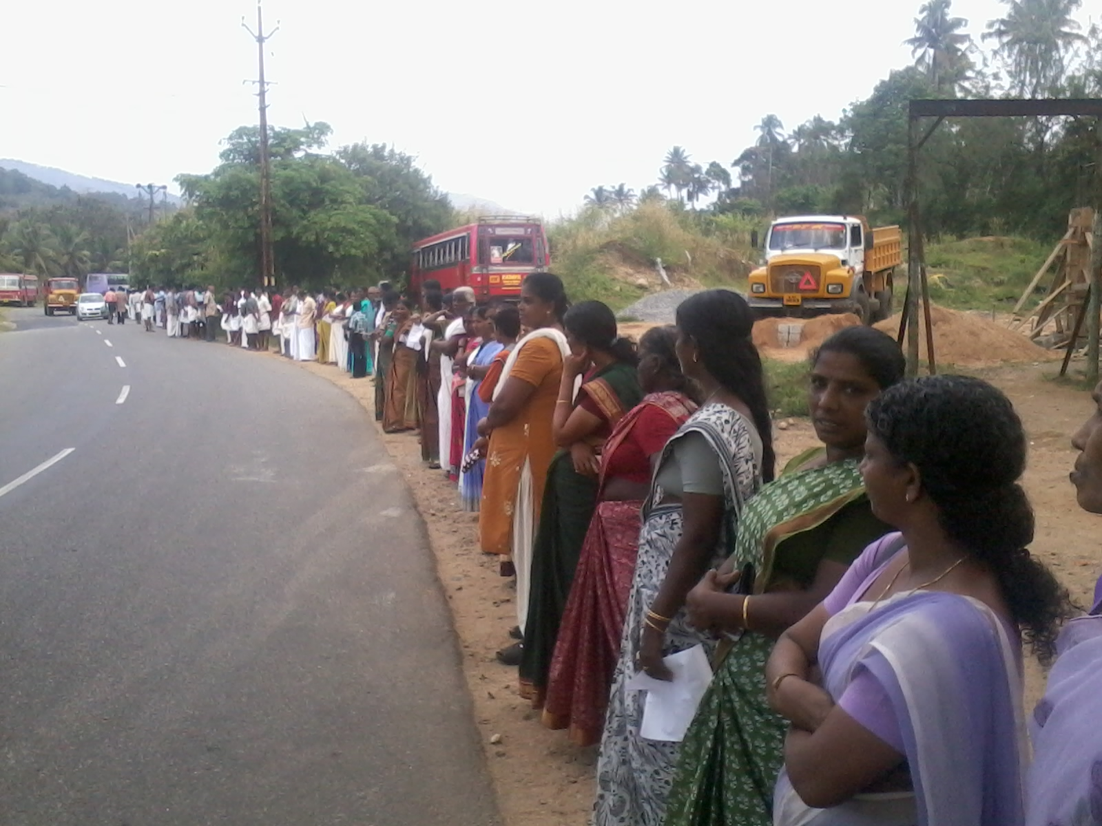 മുല്ലപ്പെരിയാര്‍ ഡാം മാറ്റി നിര്‍മ്മിക്കണം എന്നാവശ്യപ്പെട്ട് LDF നടത്തിയ മനുഷ്യ മതില്‍